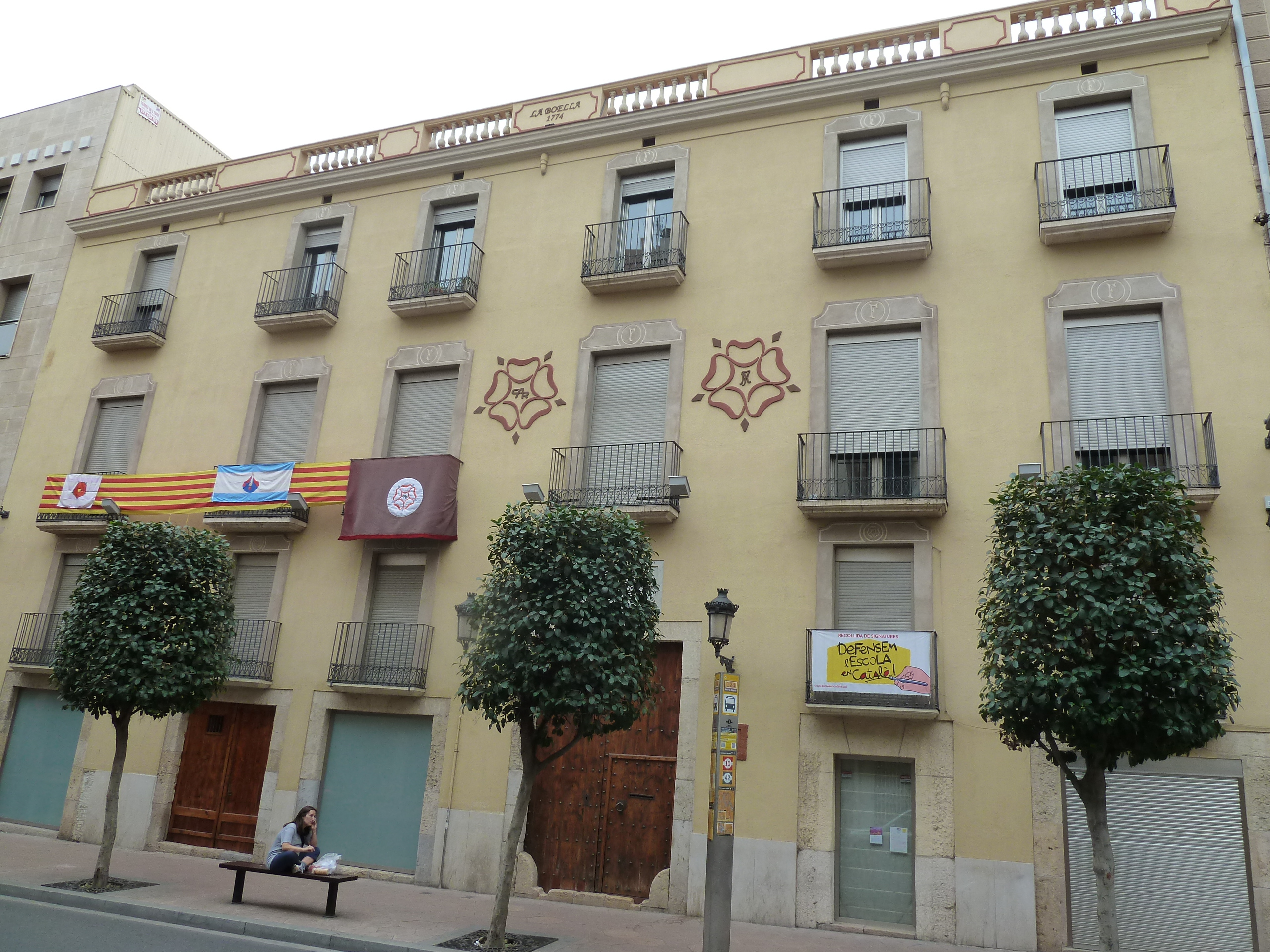 Reus